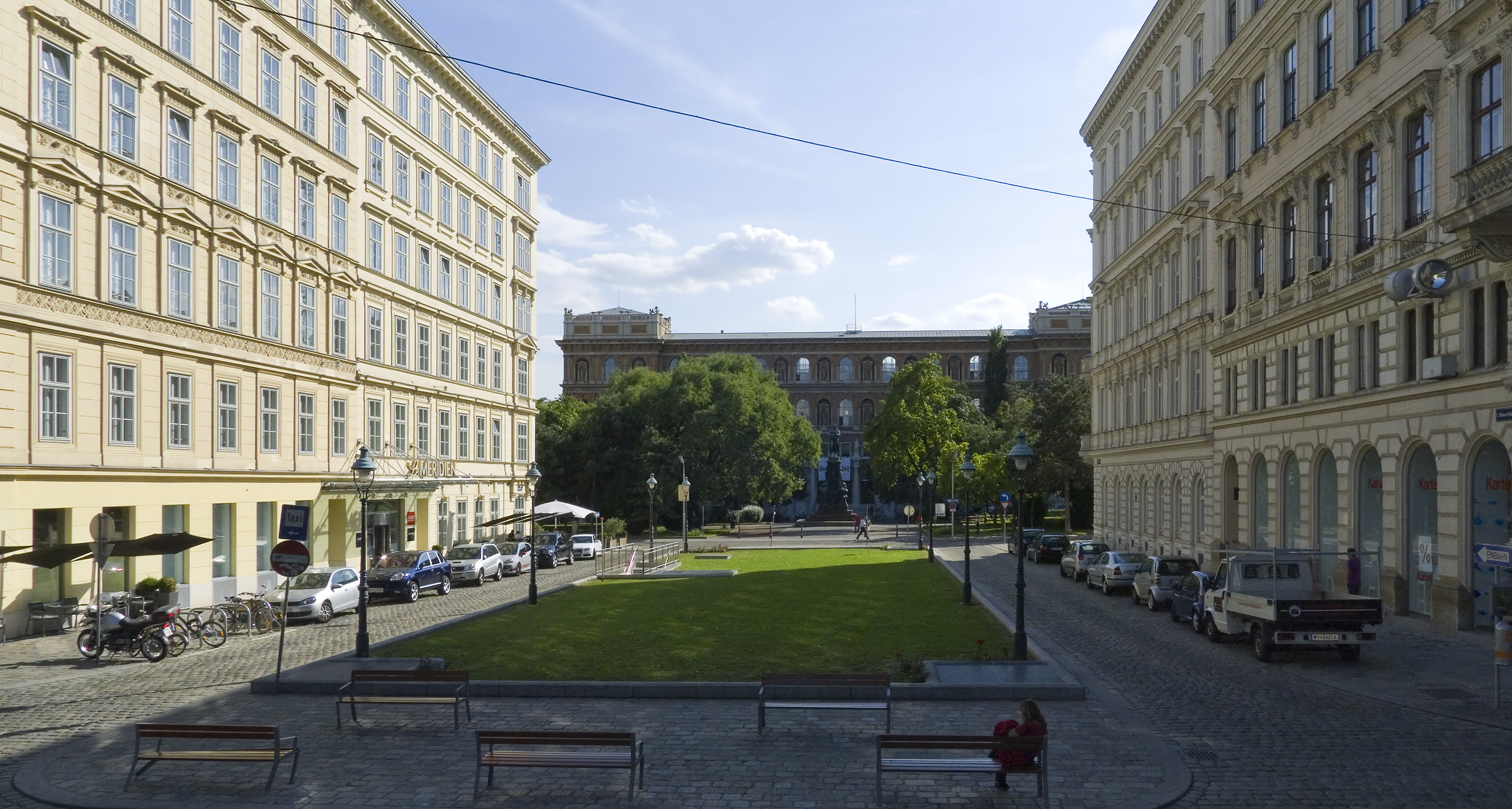 Robert-Stolz-Platz in Wien 1 beim Opernring Richtung Süden